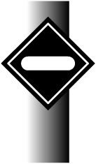 Железнодорожный сигнальный световой указатель «Опустить токоприёмник»